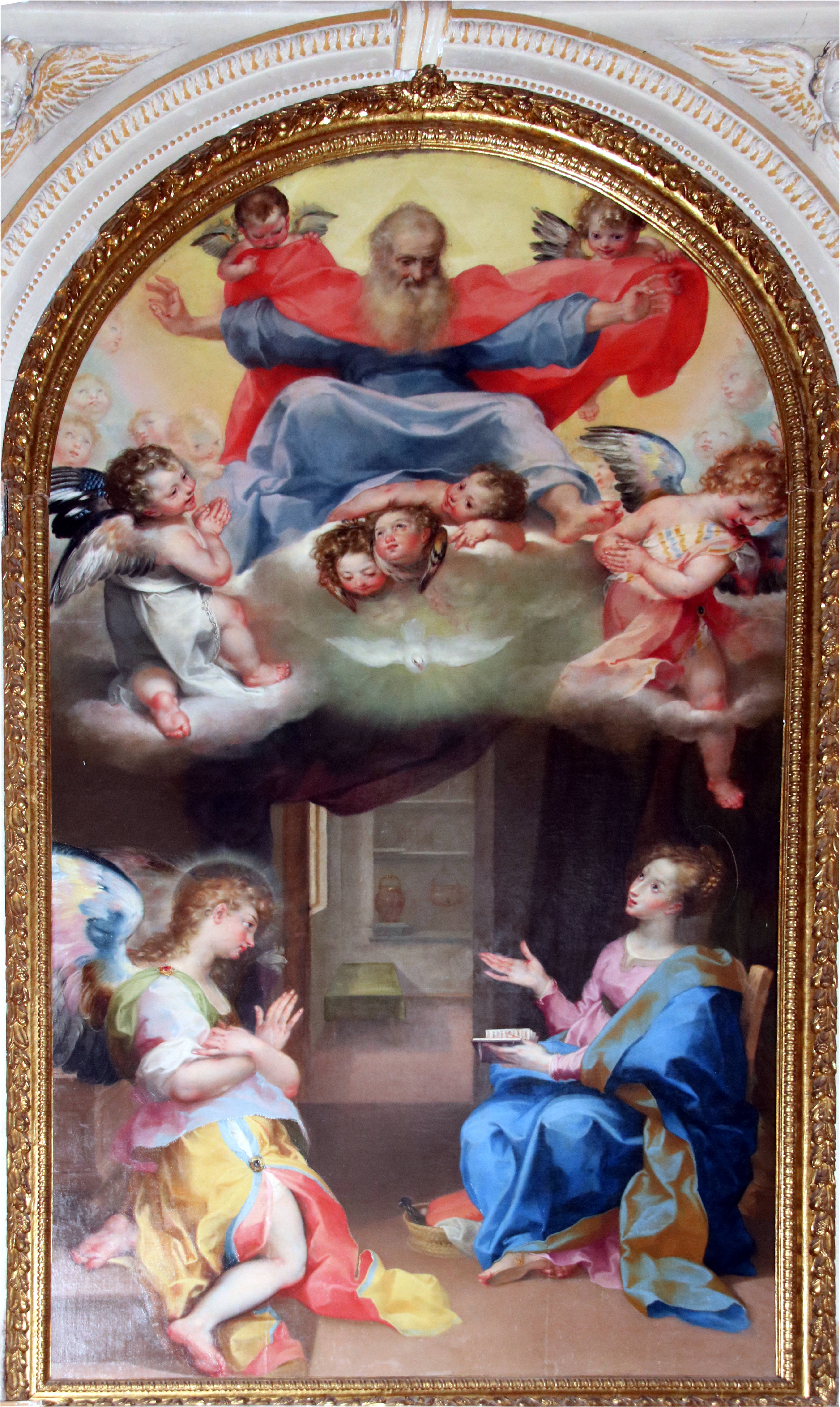 Francesco Vanni, Annunciazione, Basilica di San Clemente in Santa Maria dei Servi (Siena)